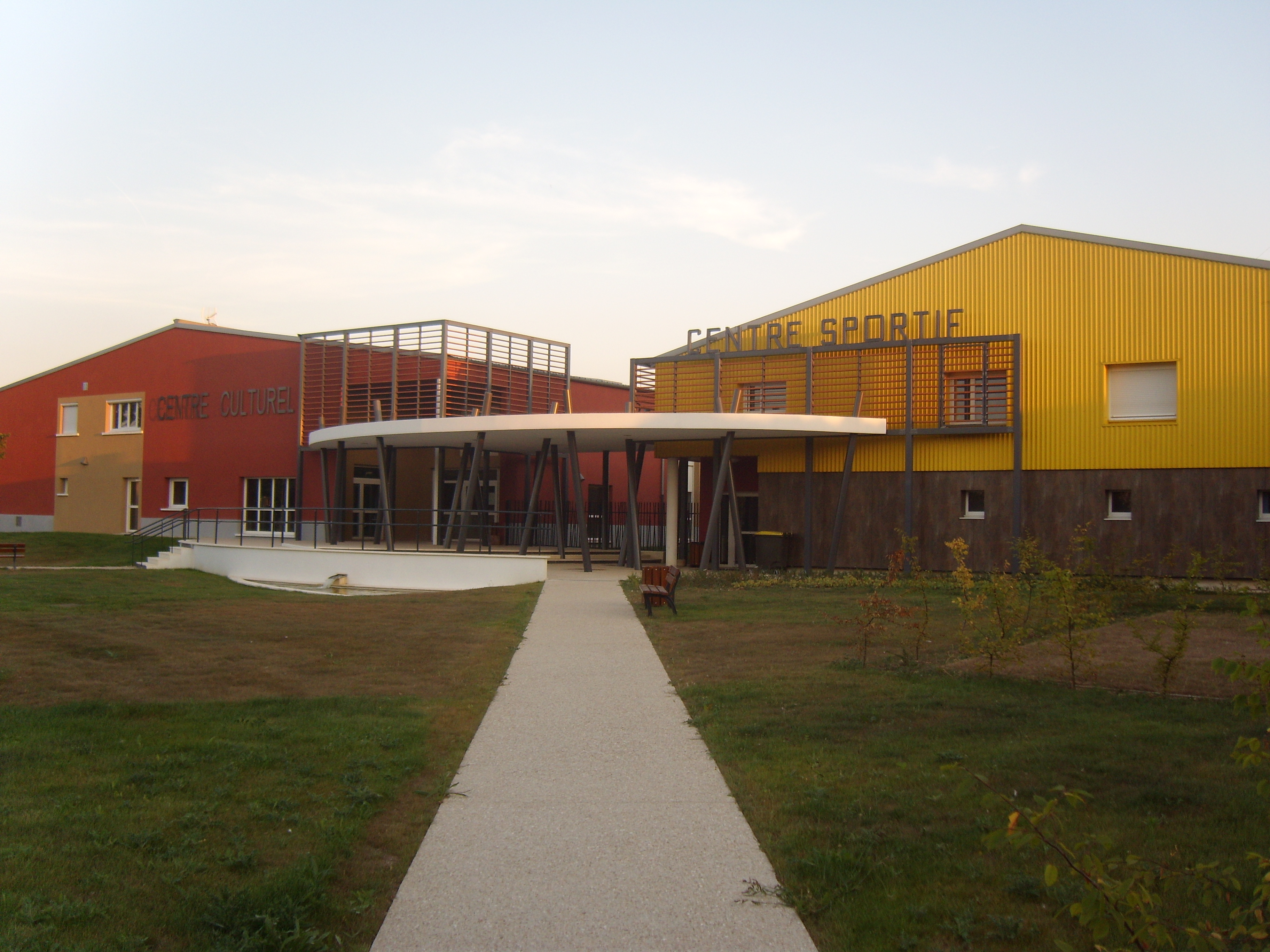 Centres sportif et culturel de Fontenay-Trésigny